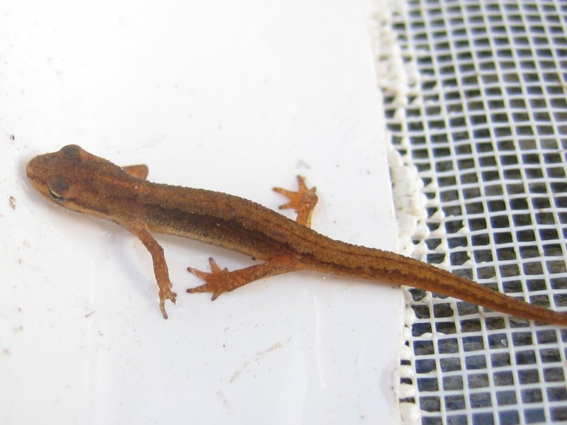 Gewöhnlicher subadulter Teichmolch Triturus vulgaris